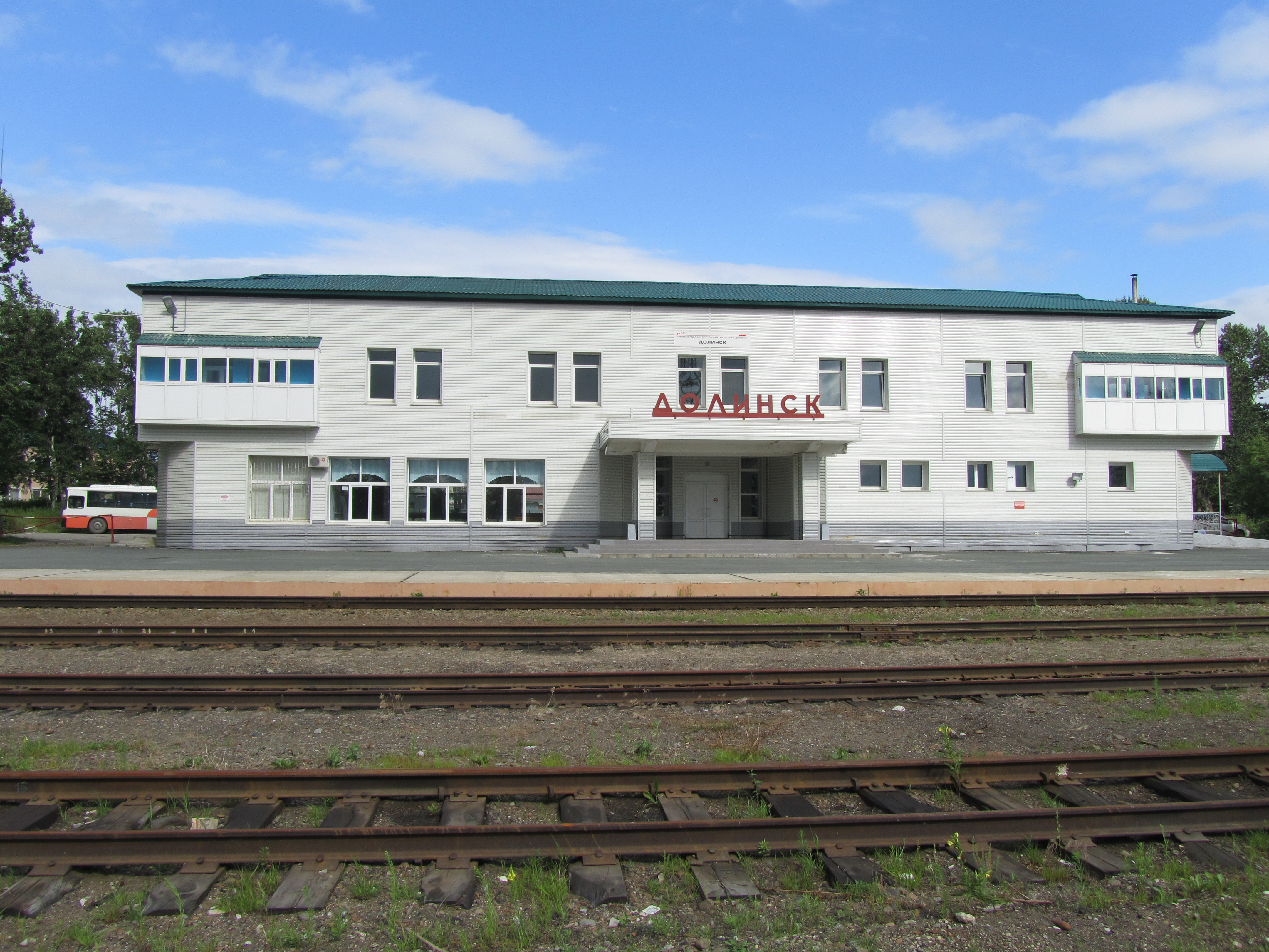 Сахалинский регион Дальневосточной железной дороги, Станция Долинск